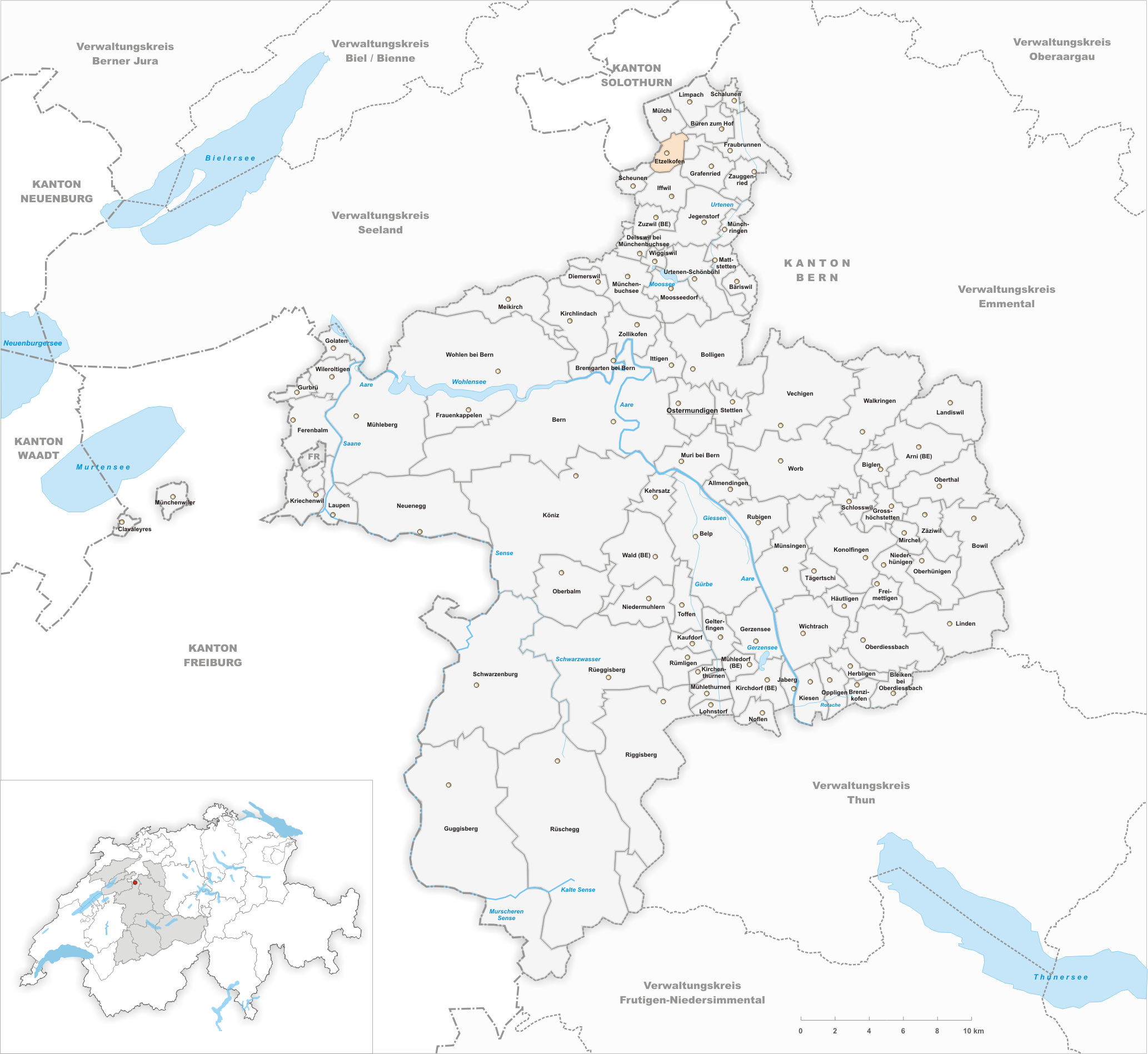 Municipality Etzelkofen